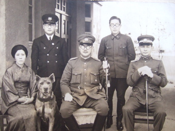 工藤忠閣下 家族との写真